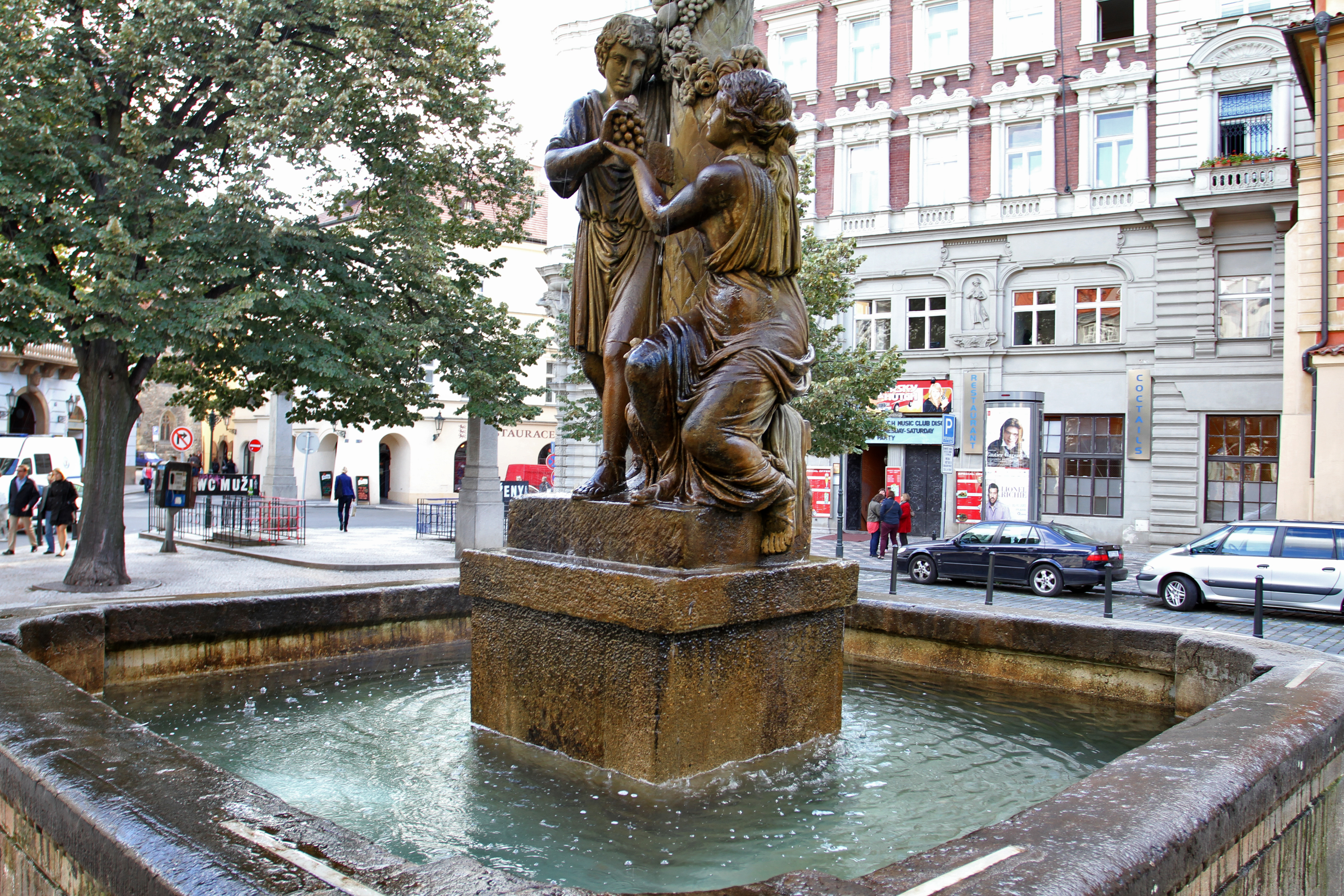 Kašna Wimmerova (Staré Město), Praha 1, Uhelný trh, Staré Město